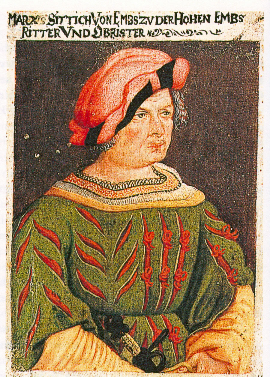 Merk Sittich von Ems Söldnerführer